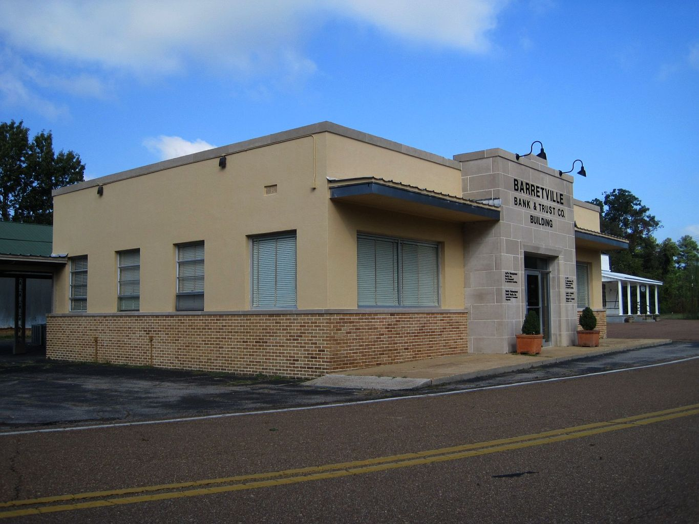 Barretville, Tennessee